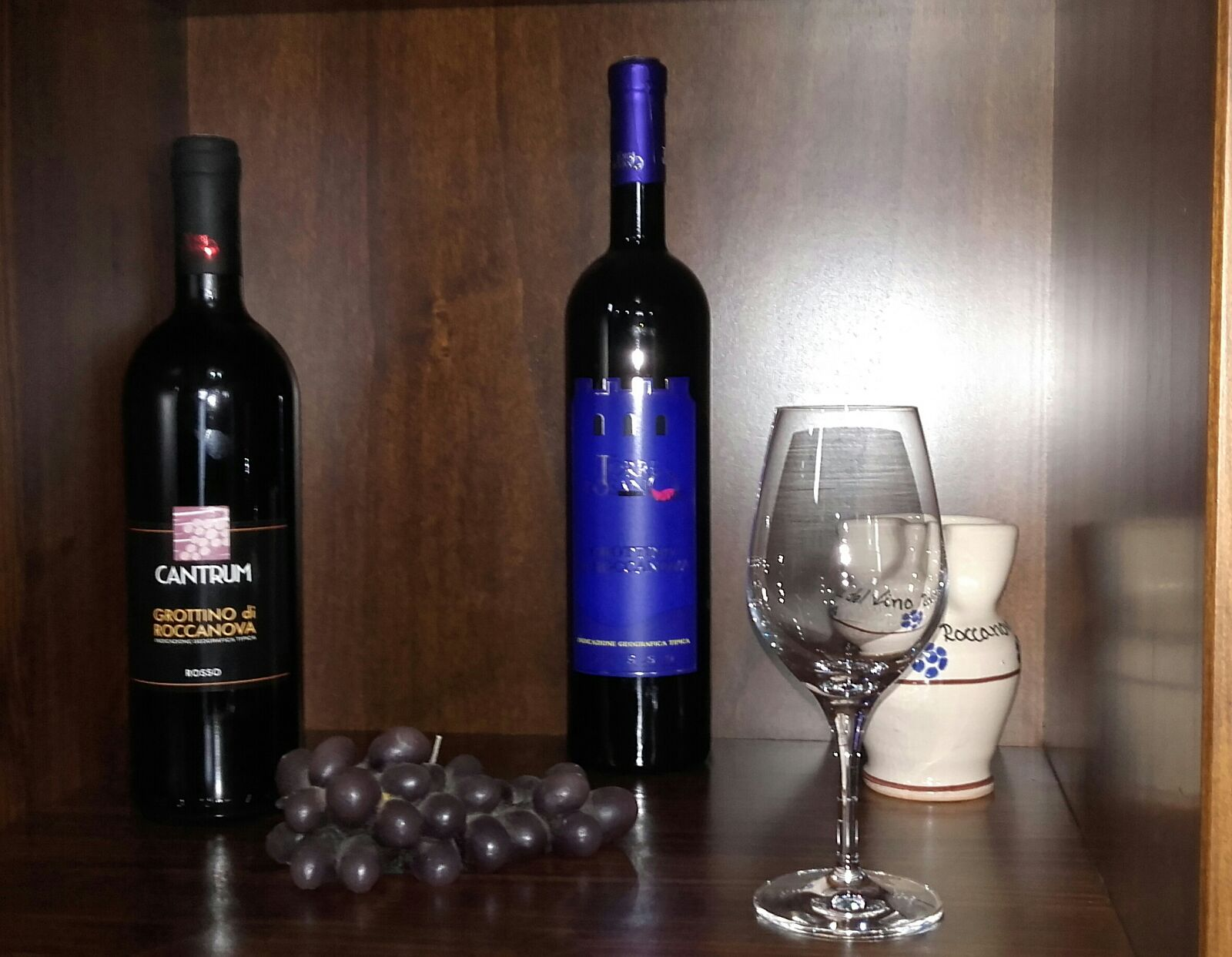 Bottiglie di vino del Grottino di Roccanova -Cantina Rosano